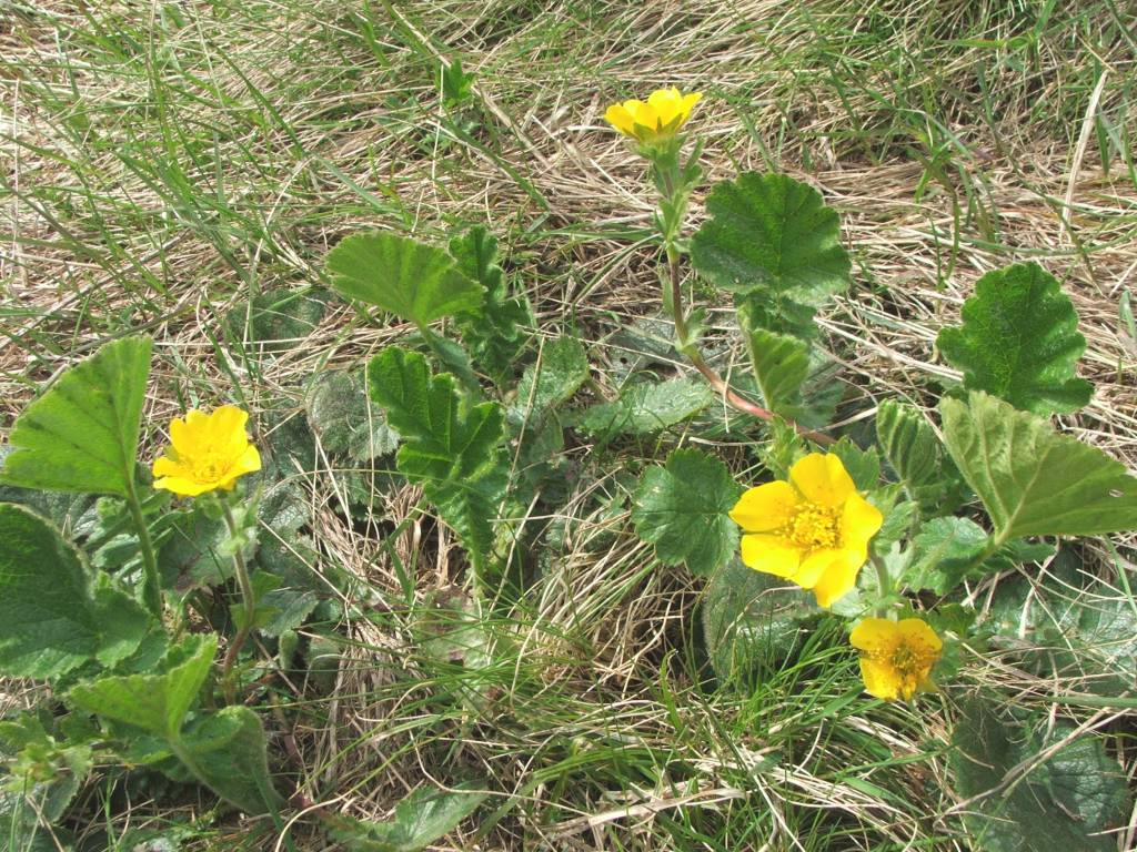 Geum montanum (pl. kuklik górski)